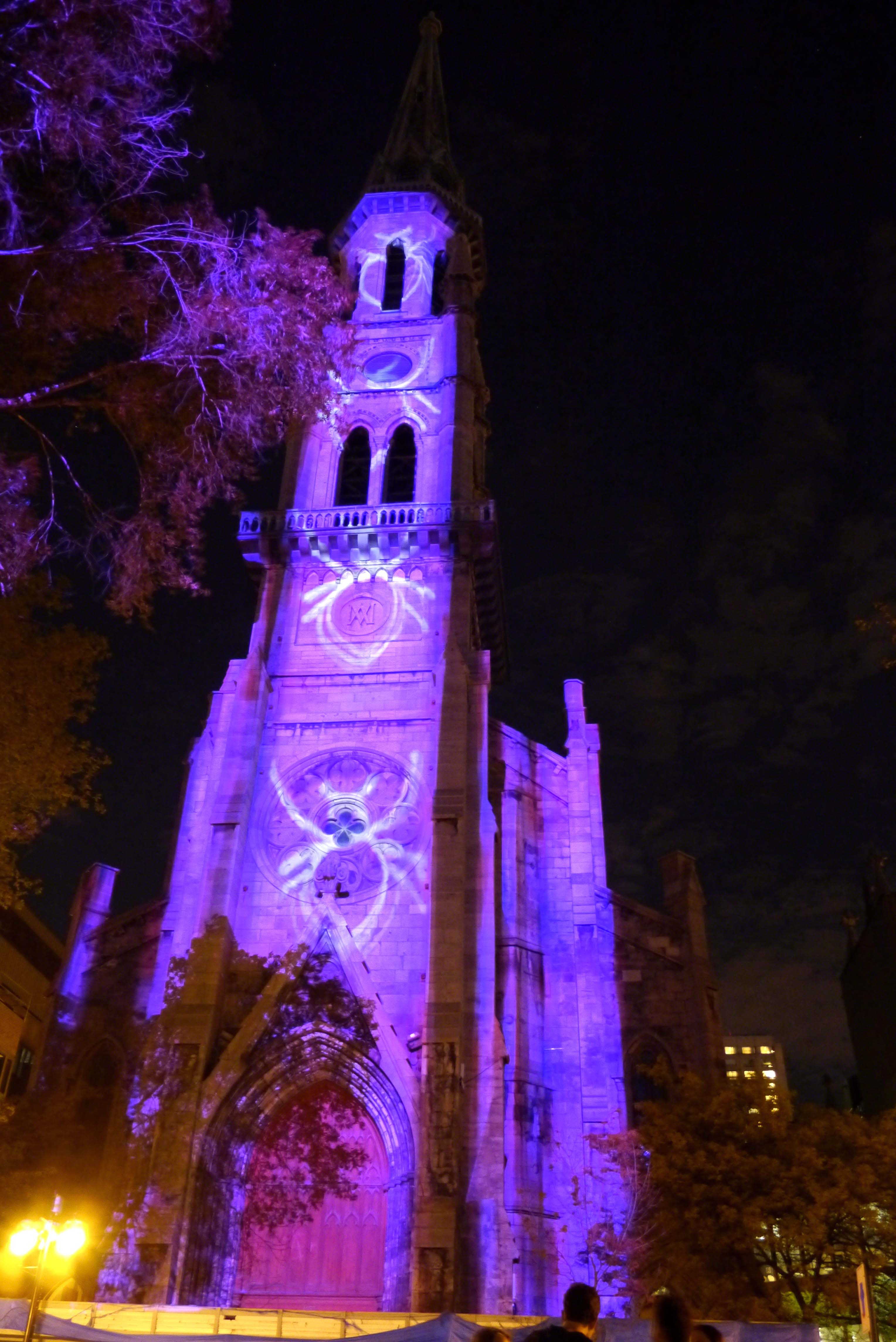 Clocher de l'UQÀM Basée sur Caprices en couleur (1949), l’œuvre Dix anagrammes autour de Norman McLaren de la cinéaste d’animation Delphine Burrus emploie une « machine à anagrammes » pour altérer des mots, oscillant du français à l’anglais. Cette démonstration ludique axée sur le bilinguisme combine des techniques d’animation d’hier et aujourd’hui, sur une trame musicale composée par Peter Culshaw. DELPHINE BURRUS (France) Delphine Burrus est une artiste parisienne formée en sculpture et en cinéma à New York. Depuis ses études, elle se spécialise en animation de marionnettes, et a réalisé ou coréalisé plusieurs fictions et vidéoclips.